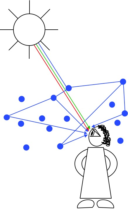 Das kurzwellige, blaue Licht wird in der Erdatmosphäre an den Luftteilchen stärker gestreut (diffus reflektiert) als das rote, gelb und grüne. Da sich viele Luftteilchen zwischen dem Betrachter und den Bergen befinden, ist die Wahrscheinlichkeit hoch, dass viele blaue Strahlen in Richtung Betrachter umgelenkt werden. So erscheint nicht nur der Himmel blau, sondern auch die entfernten Berge sehen blau aus.